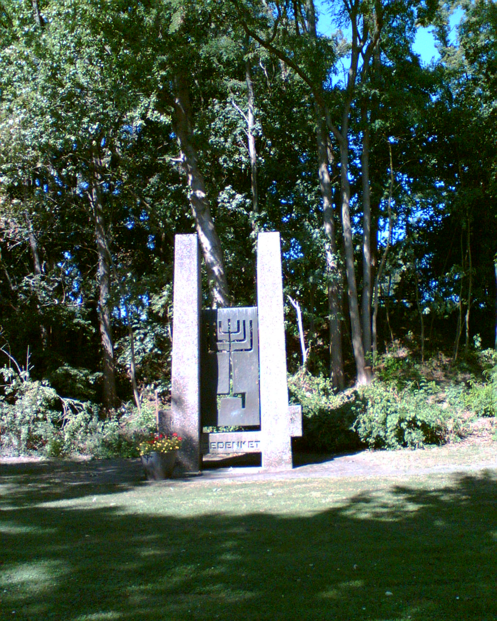 Platz der 1938 zerstörten neuen Synagoge in der Stadt Einbeck